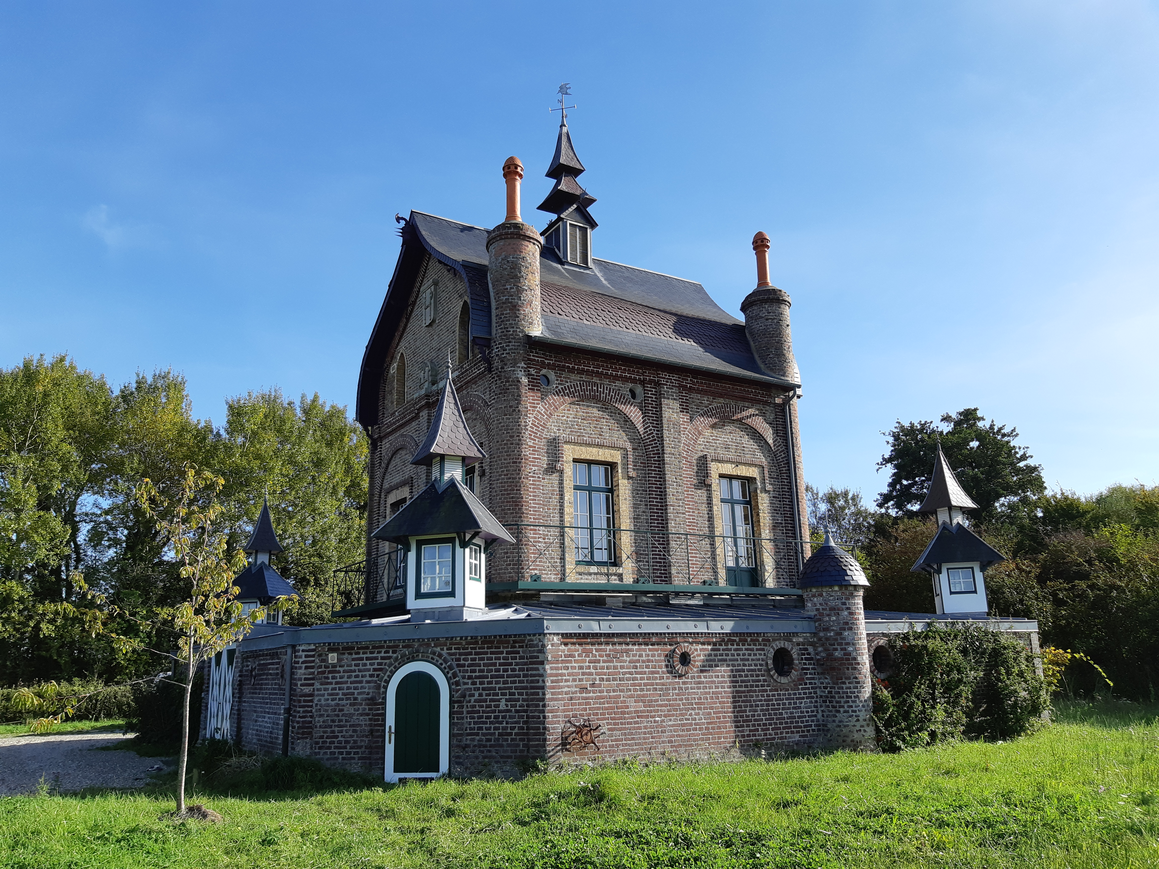 Le Chalet du gué de Blanquetaque - vu de derrière